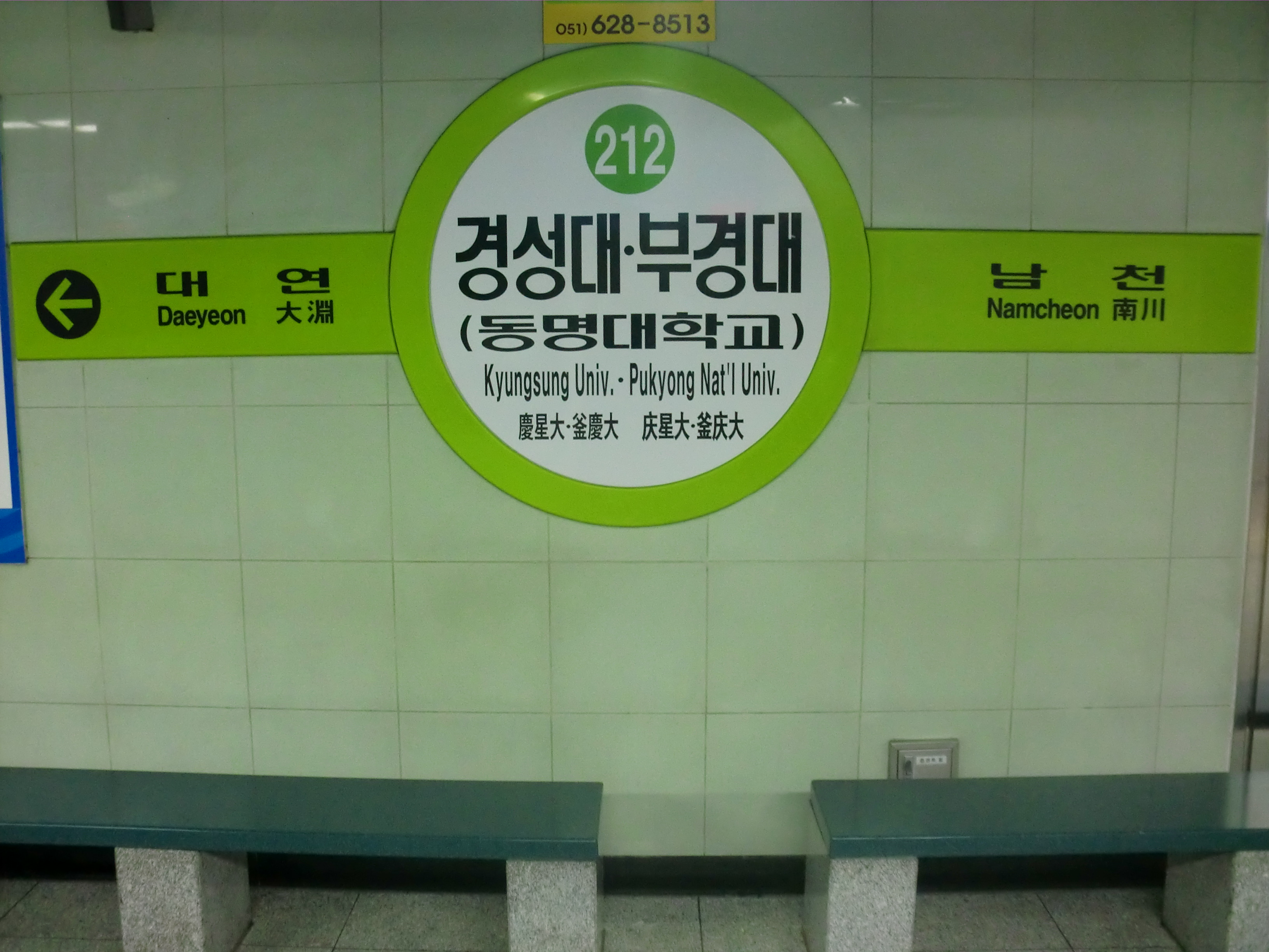 부산도시철도2호선 경성대 부경대역의 역명판